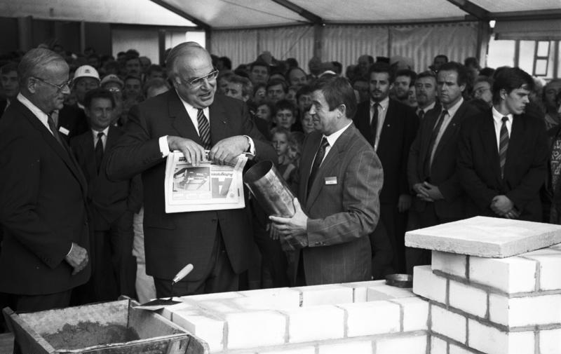 Zwickau, Helmut Kohl bei Grundsteinlegung für VW-Werk ADN/ Jan-Peter Kasper/26.9.90 Bez. Gera: Grundsteinlegung für neues VW-Werk in Mosel bei Zwickau. Bundeskanzler Helmut Kohl füllte die kupferne Kapsel eigenhändig mit Münzen, Zeitungen und anderen Dokumenten aus Zwickau und Wolfsburg, die an das denkwürdige Ereignis eine Woche vor dem Tag der Einheit erinnern soll. Abgebildete Personen: Kohl, Helmut: Bundeskanzler, Ministerpräsident von Rheinland-Pfalz, CDU, Bundesrepublik Deutschland (GND 118564595)